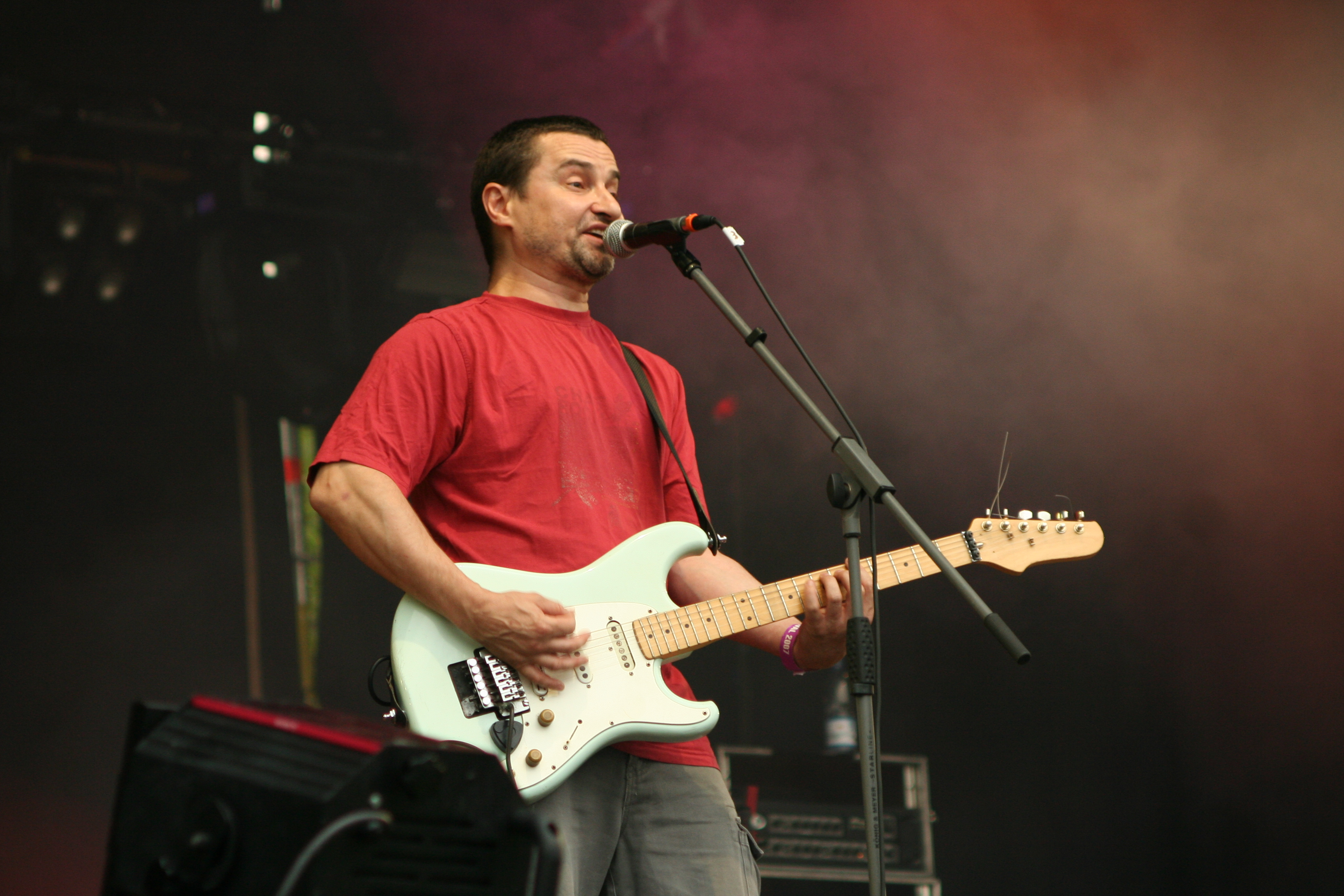 Dezerter, Off Festival, Mysłowice